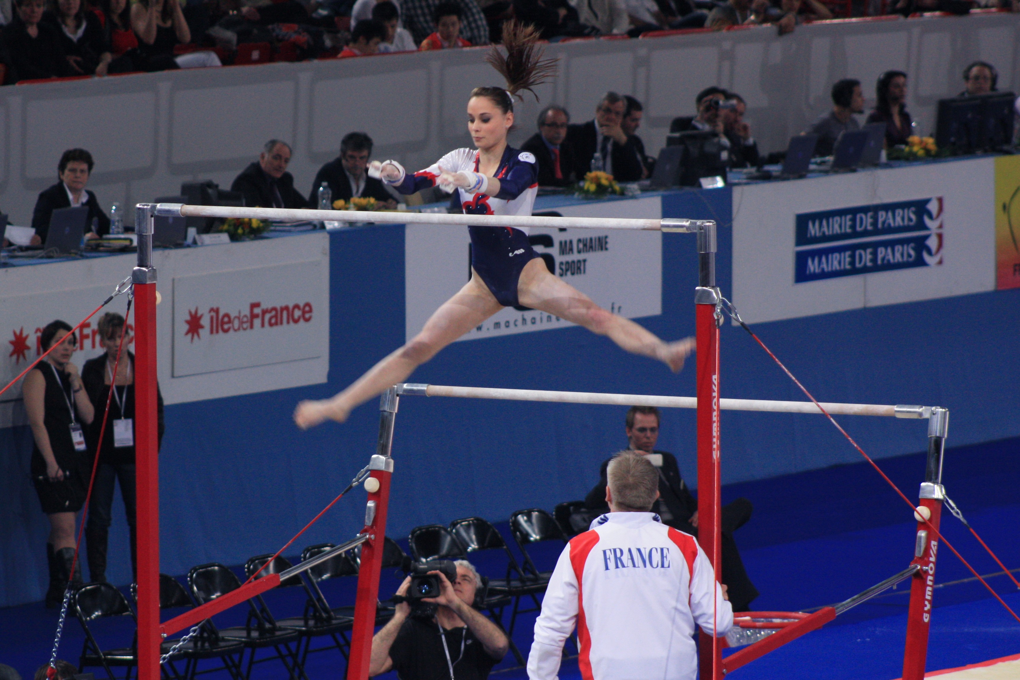 Pauline Morel en finale des barres asymétriques aux 17e Internationaux de France en 2010.